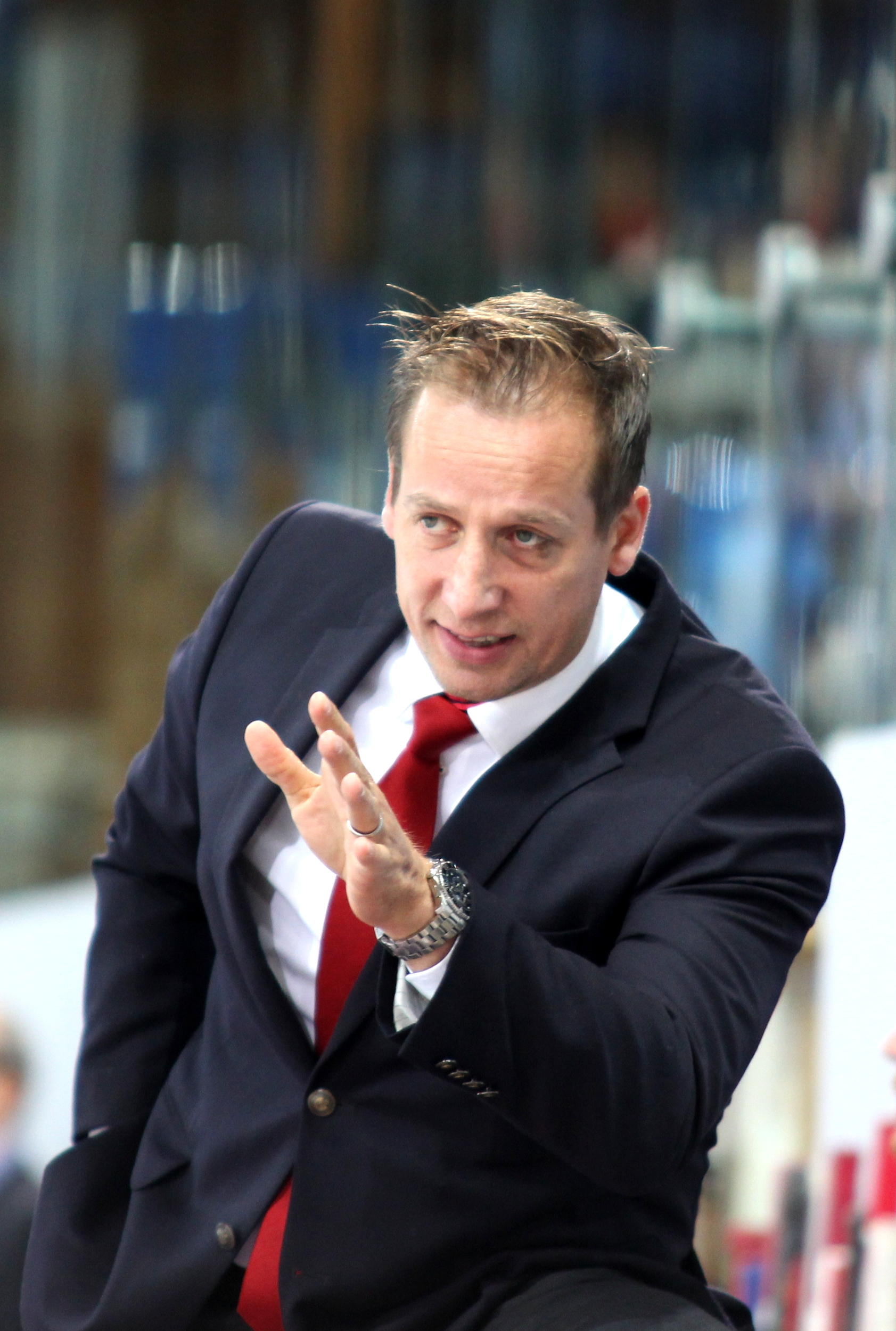 Antti Törmänen (H Head Coach).